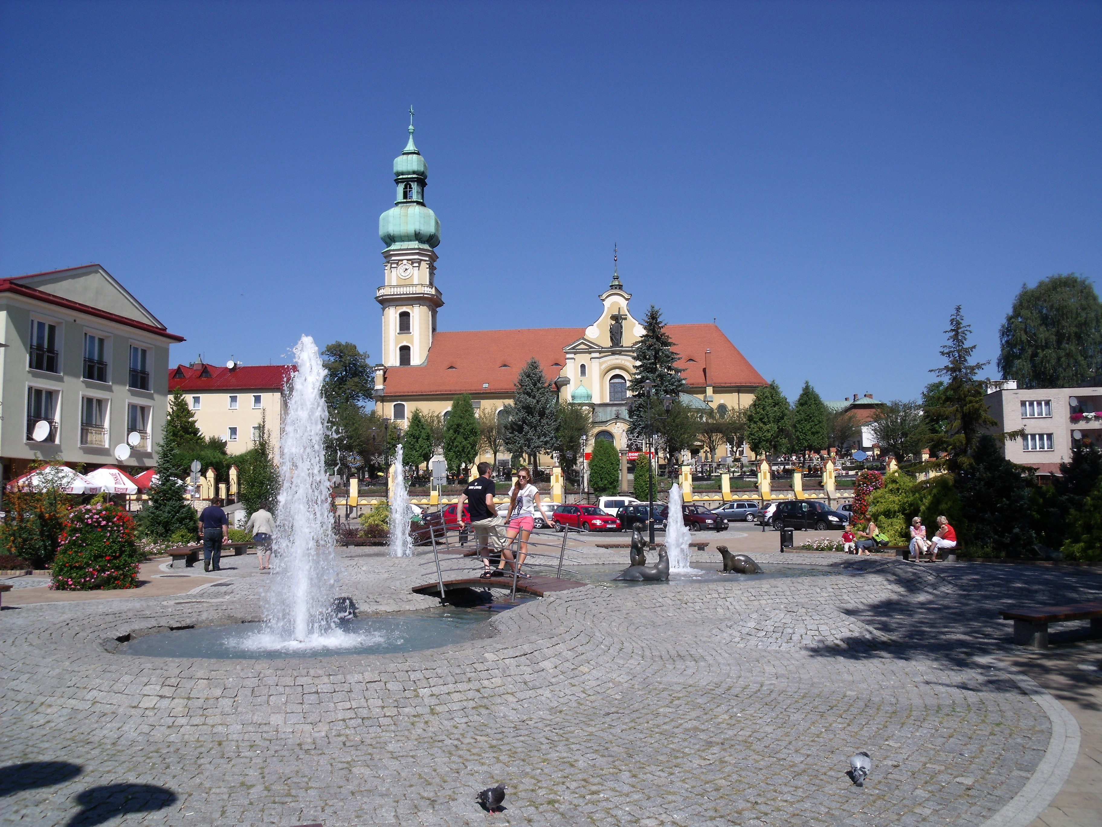 Kościół.